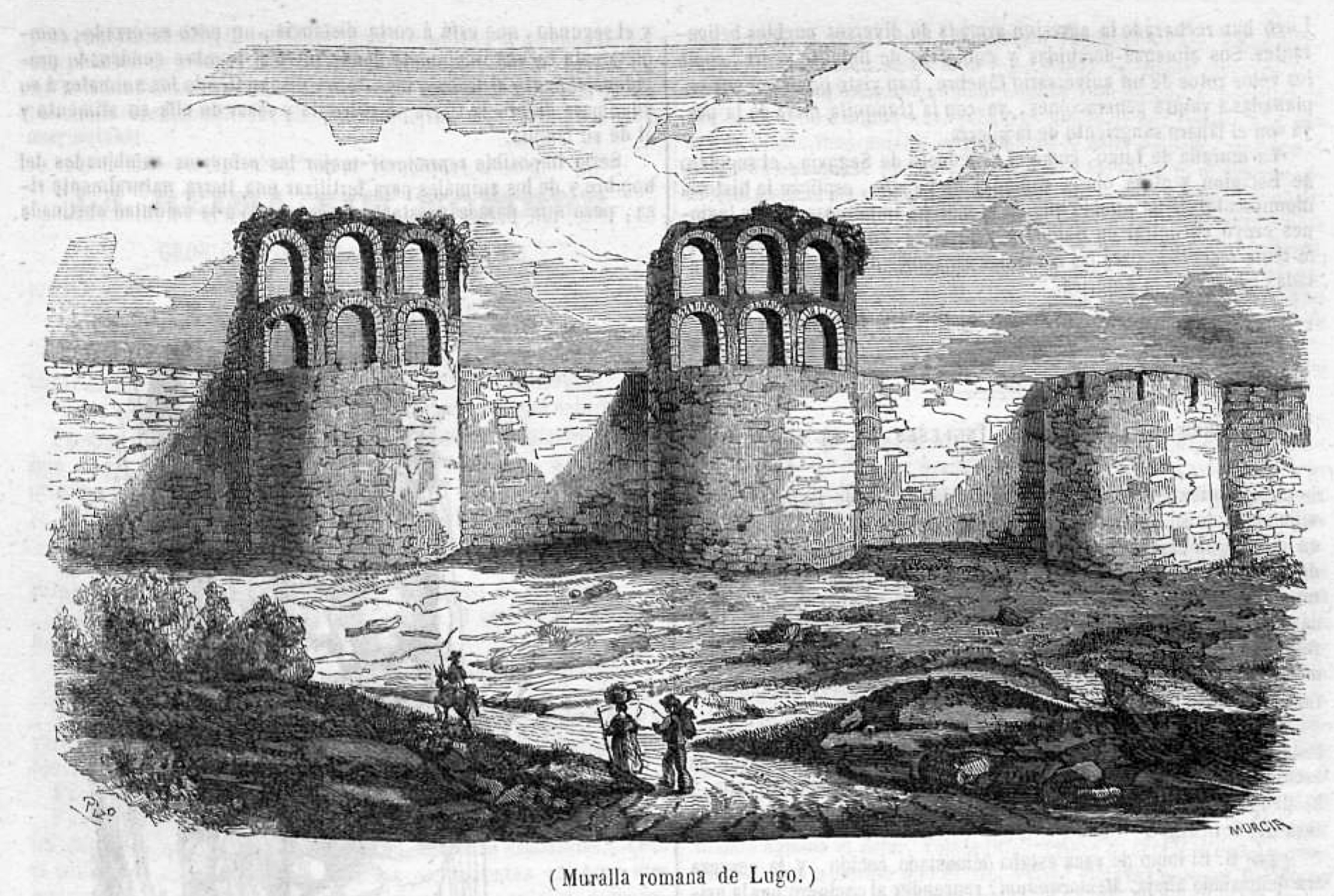 Muralla romana de Lugo.